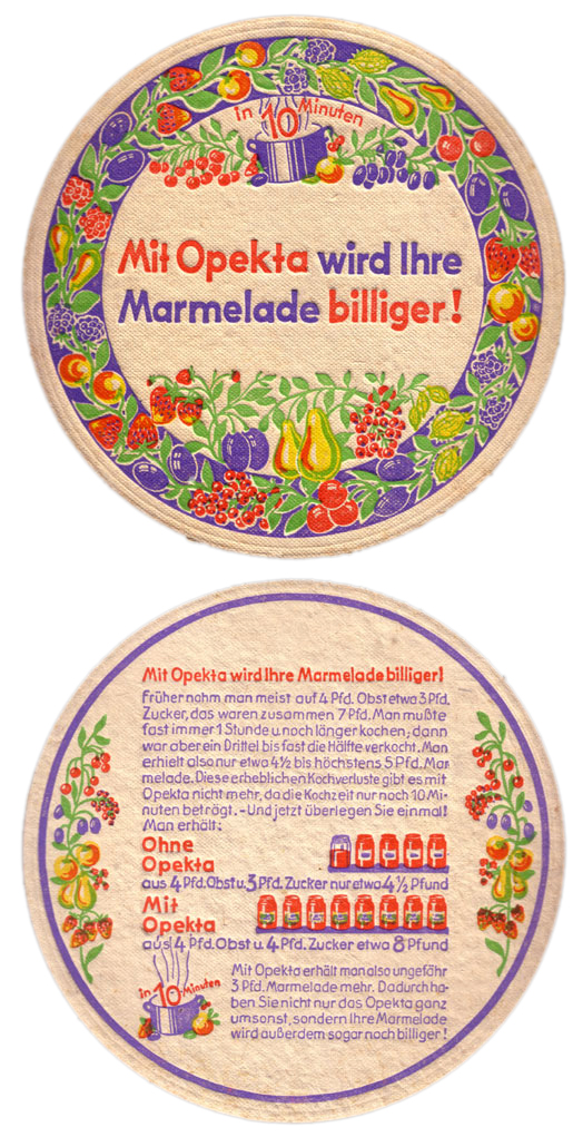 Opekta Papp-Untersetzer für Kochtöpfe mit der Geschäftsidee (Vorder- und Rückseite)